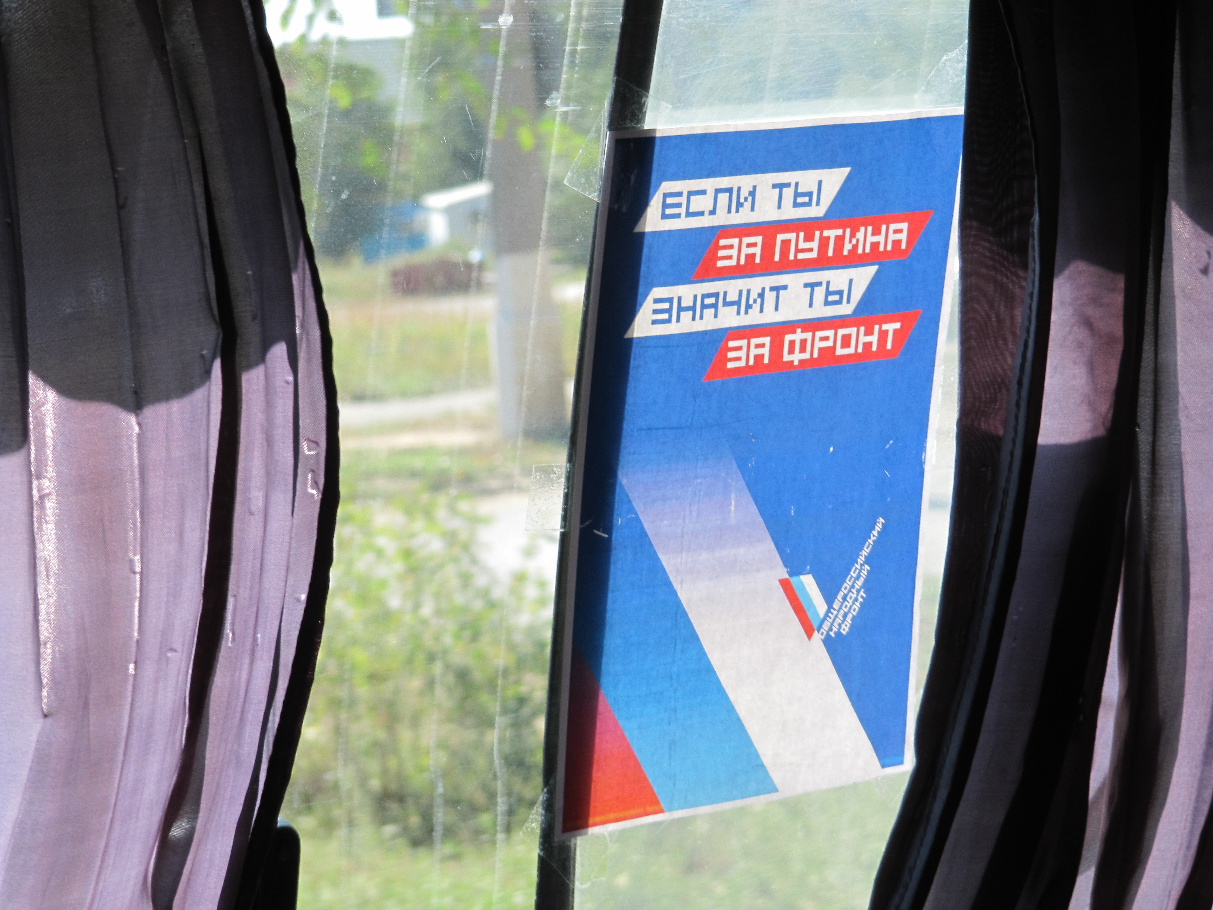 Агитационный листок Общенационального народного фронта